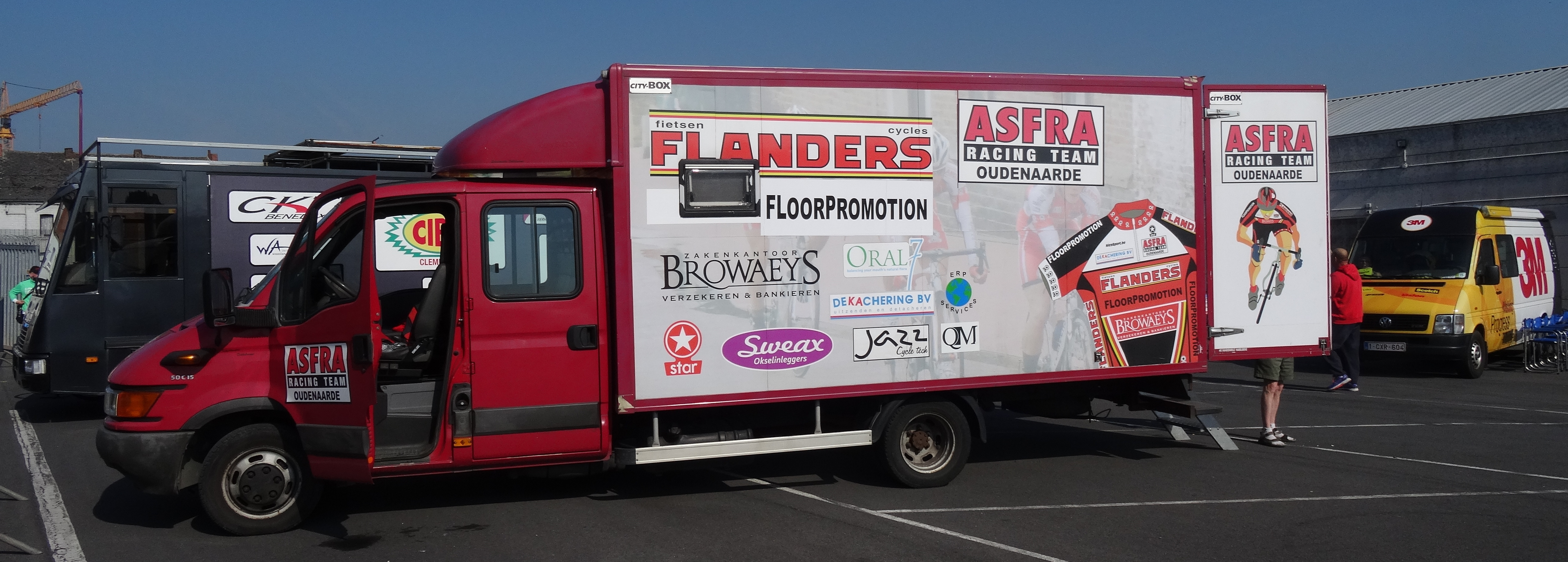 Reportage réalisé le samedi 17 mai à l'occasion du départ du Grand Prix Criquielion 2014 à Boussu, Belgique.